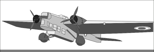 Amiot 143